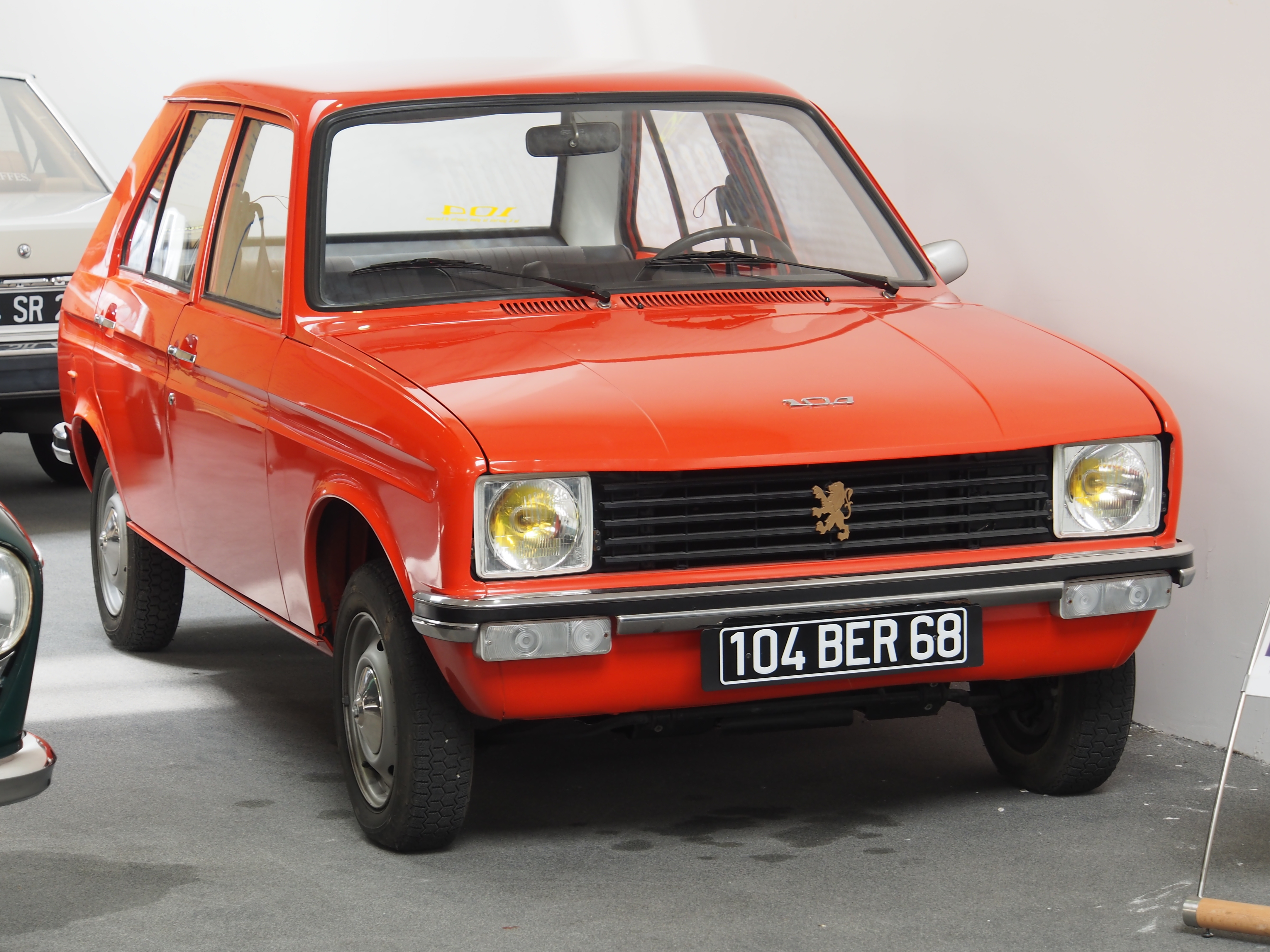 Photographed at the Musée de l'Aventure Peugeot-Sochaux, France.